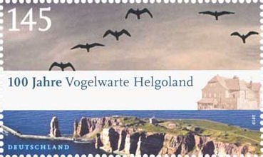 Blockausgaben